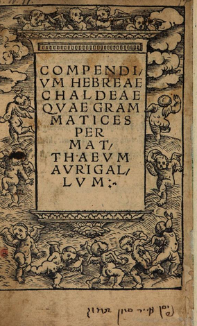 Compendium Hebrae Chaldeaeque grammatices, 1525, Matthäus Aurogallus Commutoviensis (1488-1560)